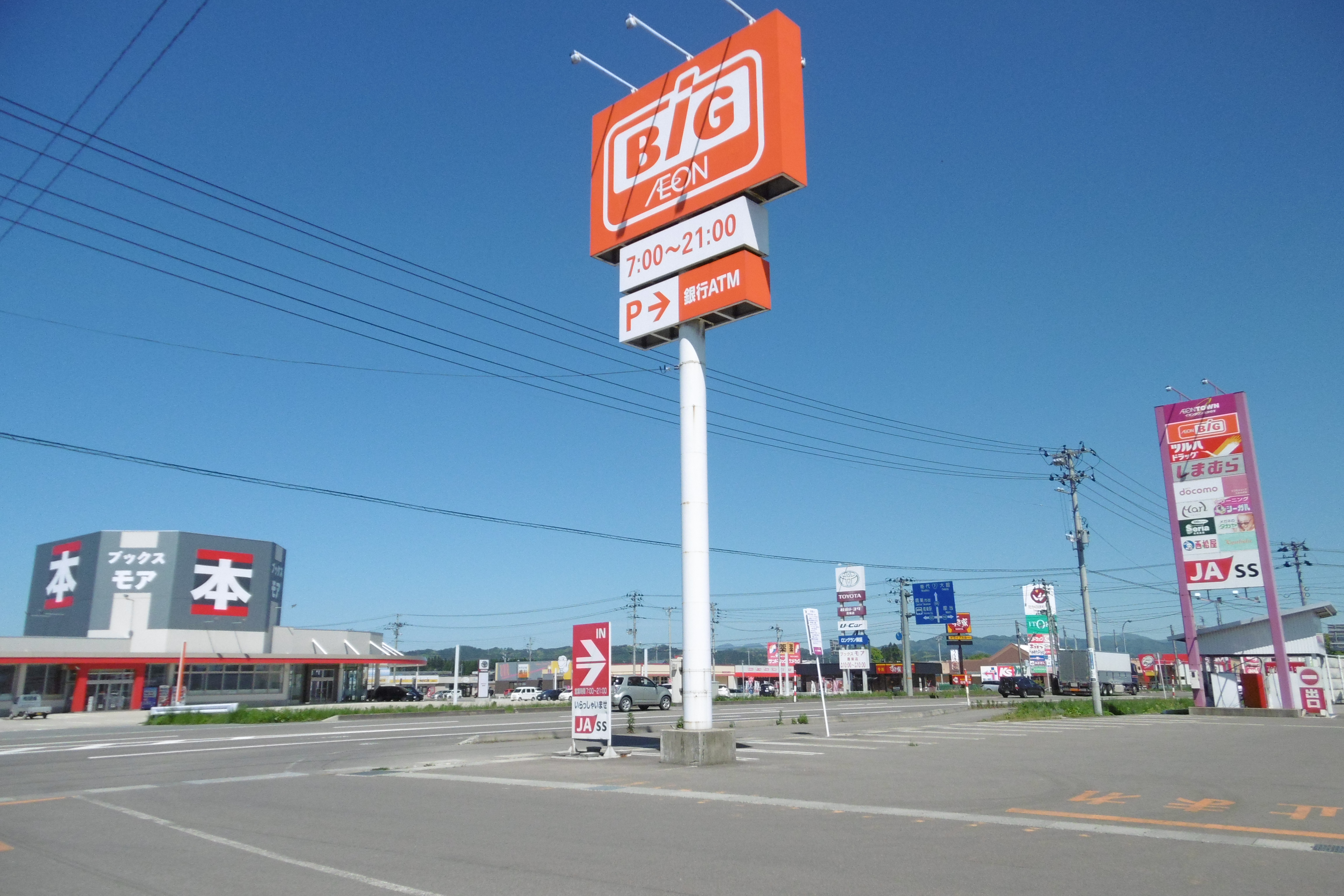 国道105号 鷹巣バイパス 中綱交差点周辺（秋田県北秋田市）